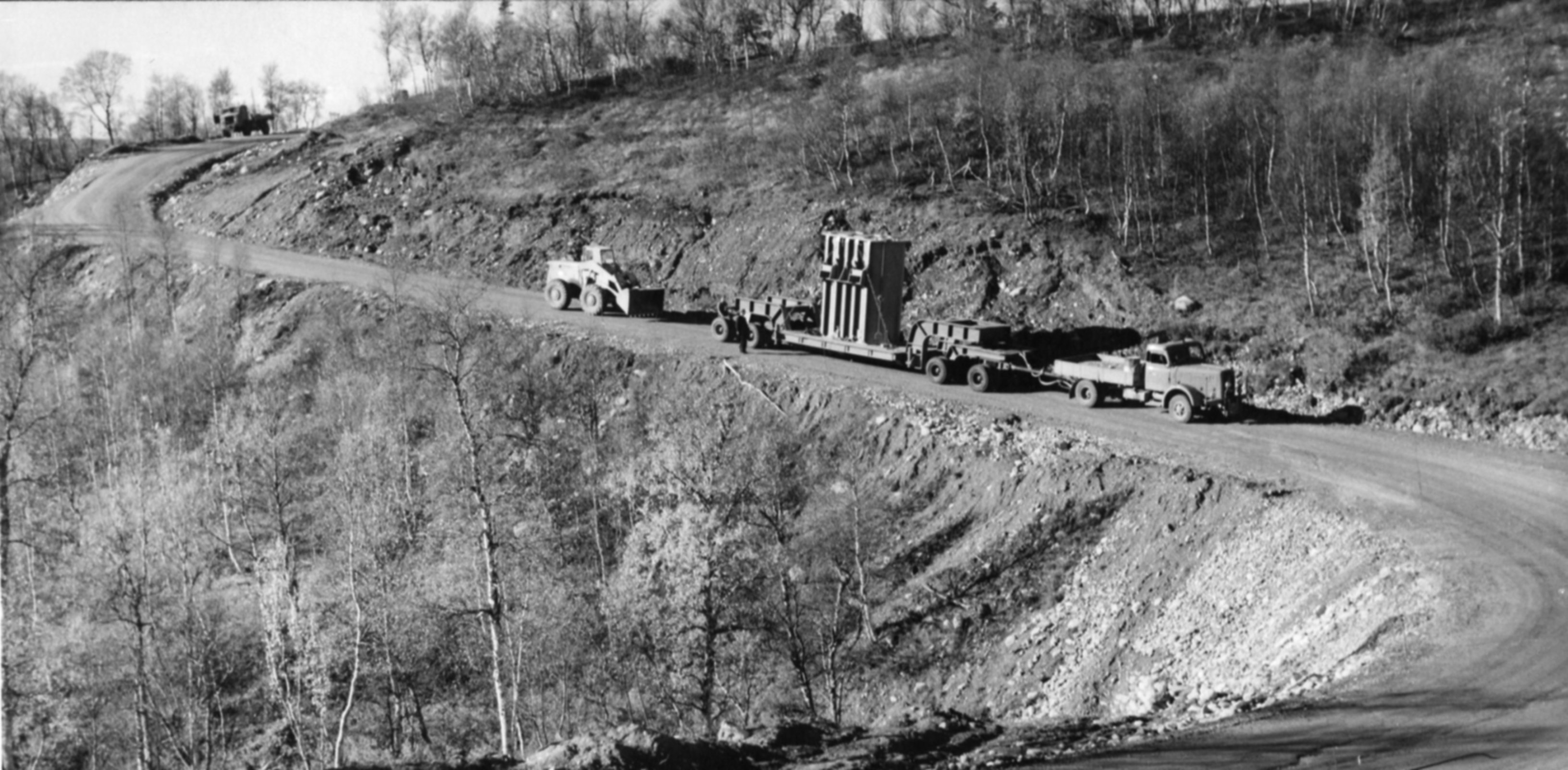 Format: Fotopositiv Dato / Date: 29. september 1960 Fotograf / Photographer: Oskar A Johansen Sted / Place: Mellom Reitan og Tydal i Sør-Trøndelag Eier / Owner Institution: Trondheim byarkiv, The Municipal Archives of Trondheim Lenke / Link: Nea kraftverk på Wikipedia Arkivreferanse / Archive reference: Tor.H43.B75.F5208 Nea kraftverk ble offisielt åpnet av statsminister Einar Gerhardsen sammen med den svenske statsministeren Tage Erlander 26. september 1960. (Kilde: Wikipedia)